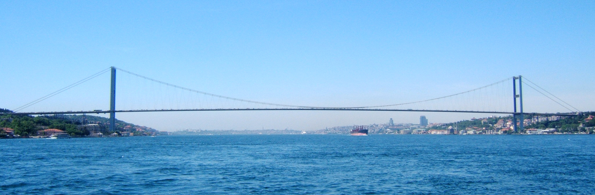 Pont du Bosphore, avec la vieille ville d'Istanbul en arrière plan Photo Pierre LEBEAU